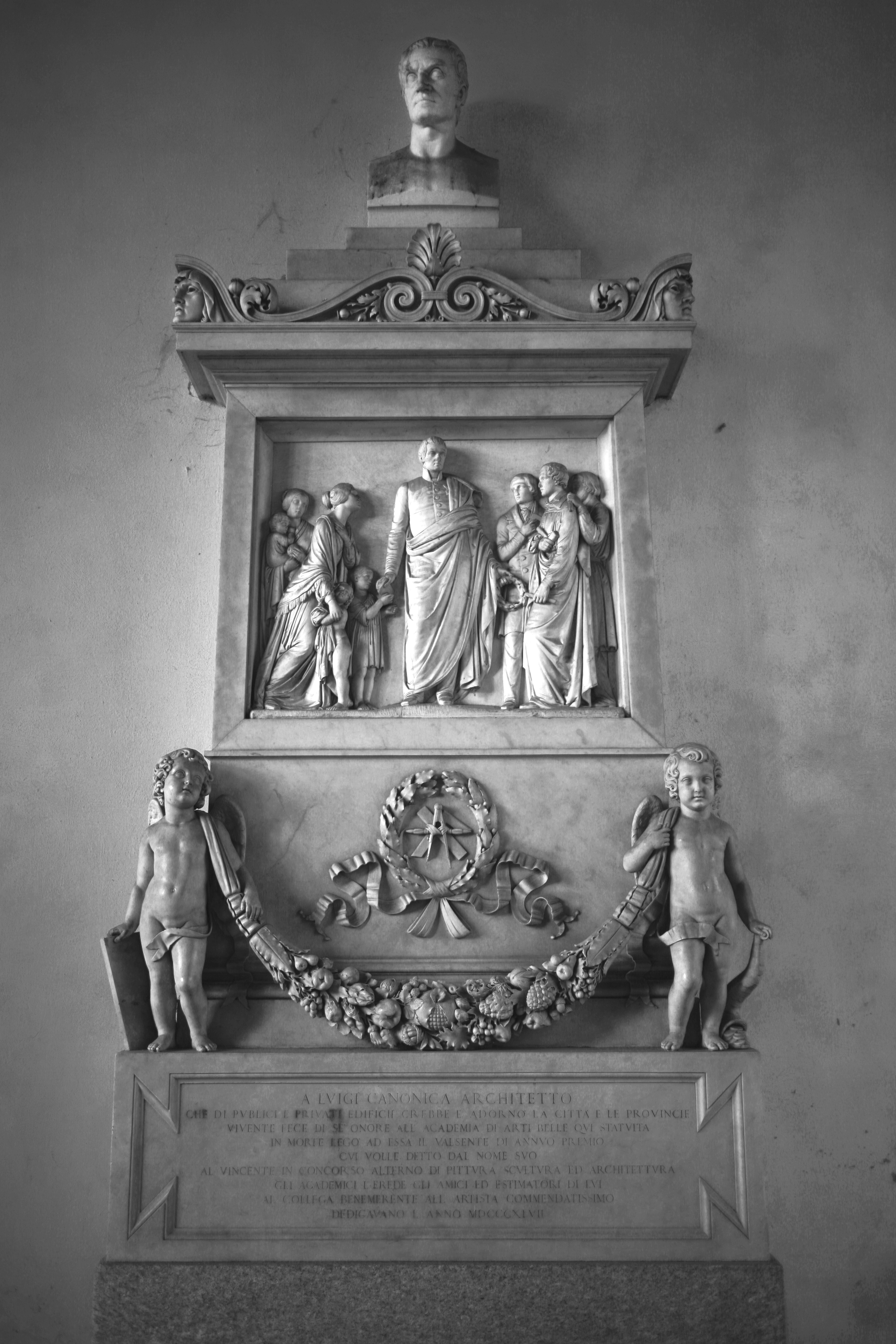 Monumento a Luigi Canonica (1846-1847), Accademia di Belle Arti di Brera, Milano, opera dello scultore Raffaele Monti